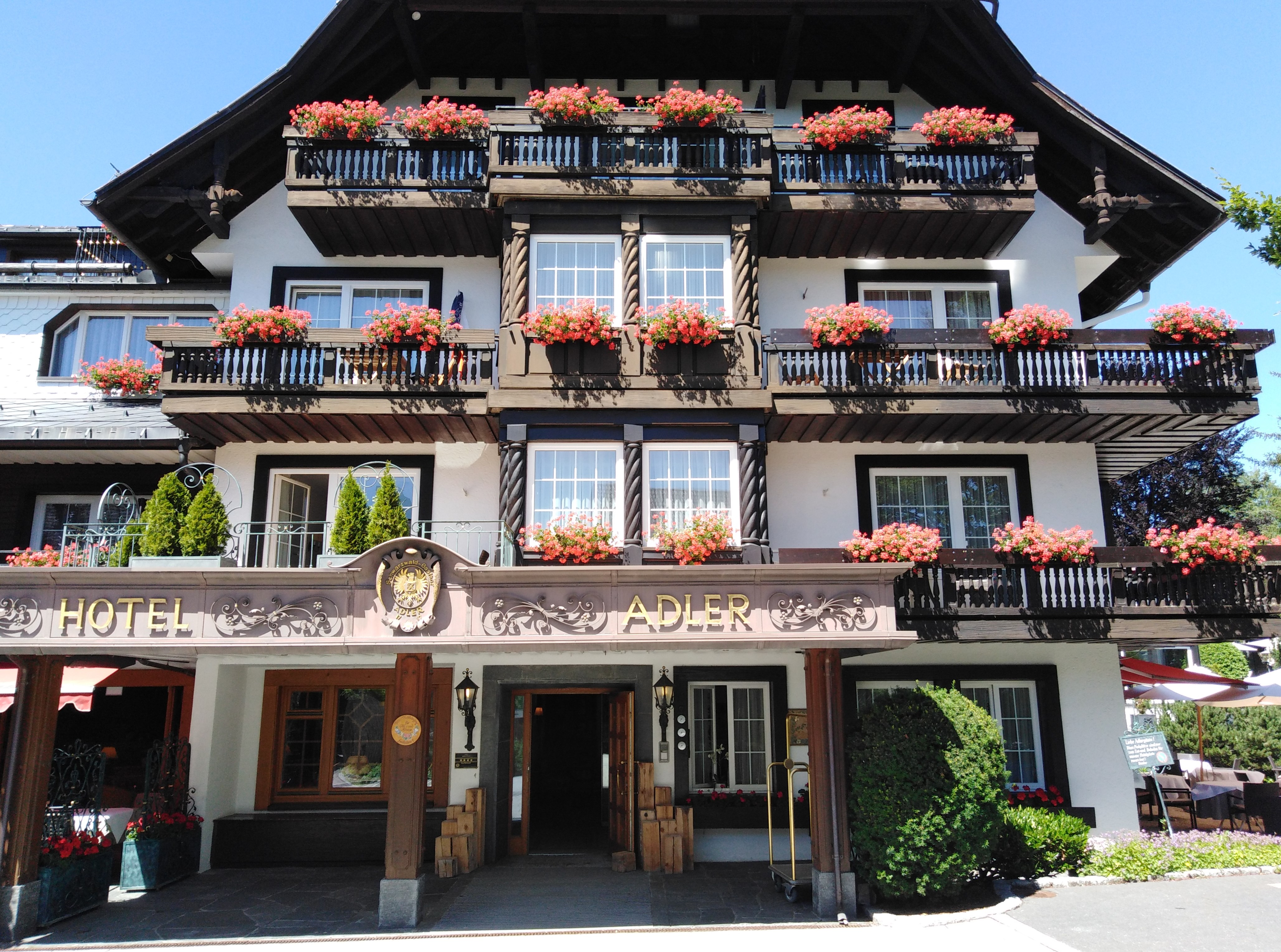 Gasthof Adler in der Gemeinde Häusern im Landkreis Waldshut in Baden-Württemberg im Südschwarzwald. Der Gasthof führt einen Doppeladler (als Schwarzwaldhaus 1596 nachweisbar). Seit 1966 wird das Restaurant Adler Häusern mit einem Michelin Stern ausgezeichnet. Es gilt als das älteste Sternerestaurant Deutschlands.